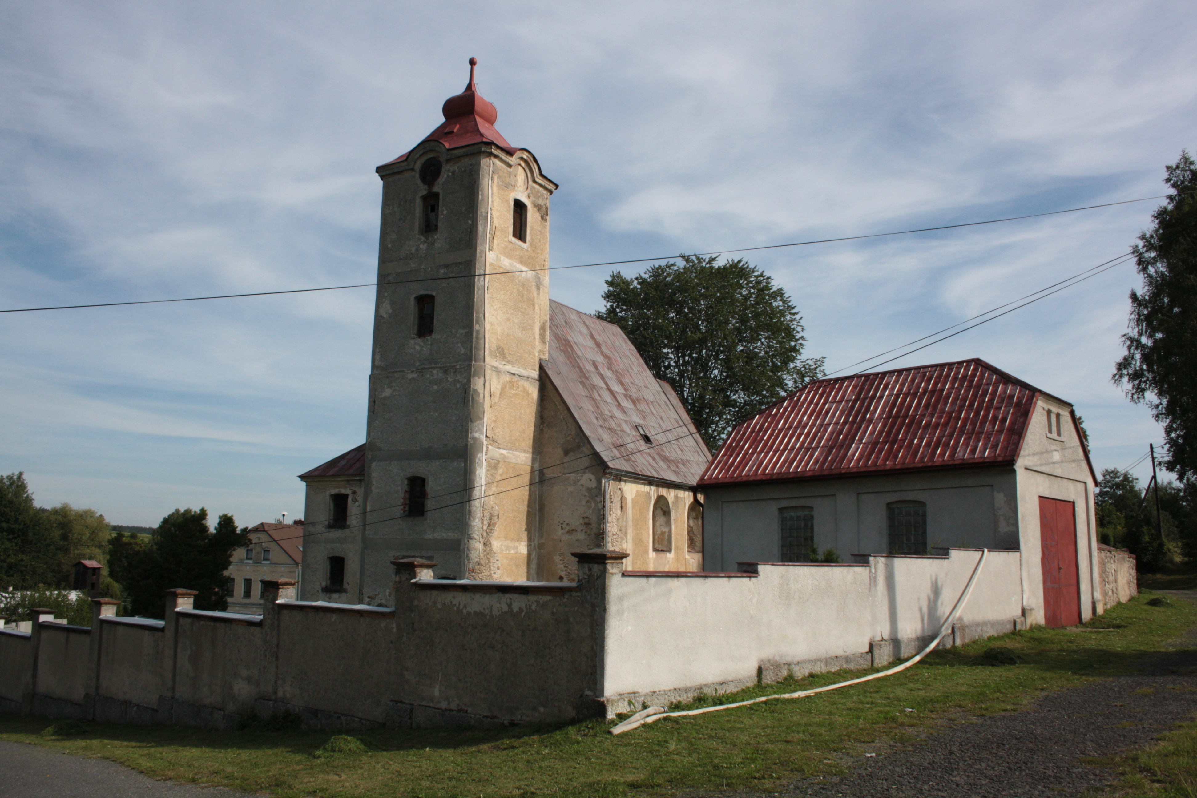 This photograph was taken with a DSLR from WMCZ's Camera grant. Kostel Neposkvrněného Početí Panny Marie v Horní Řasnici (pohled od jihu).